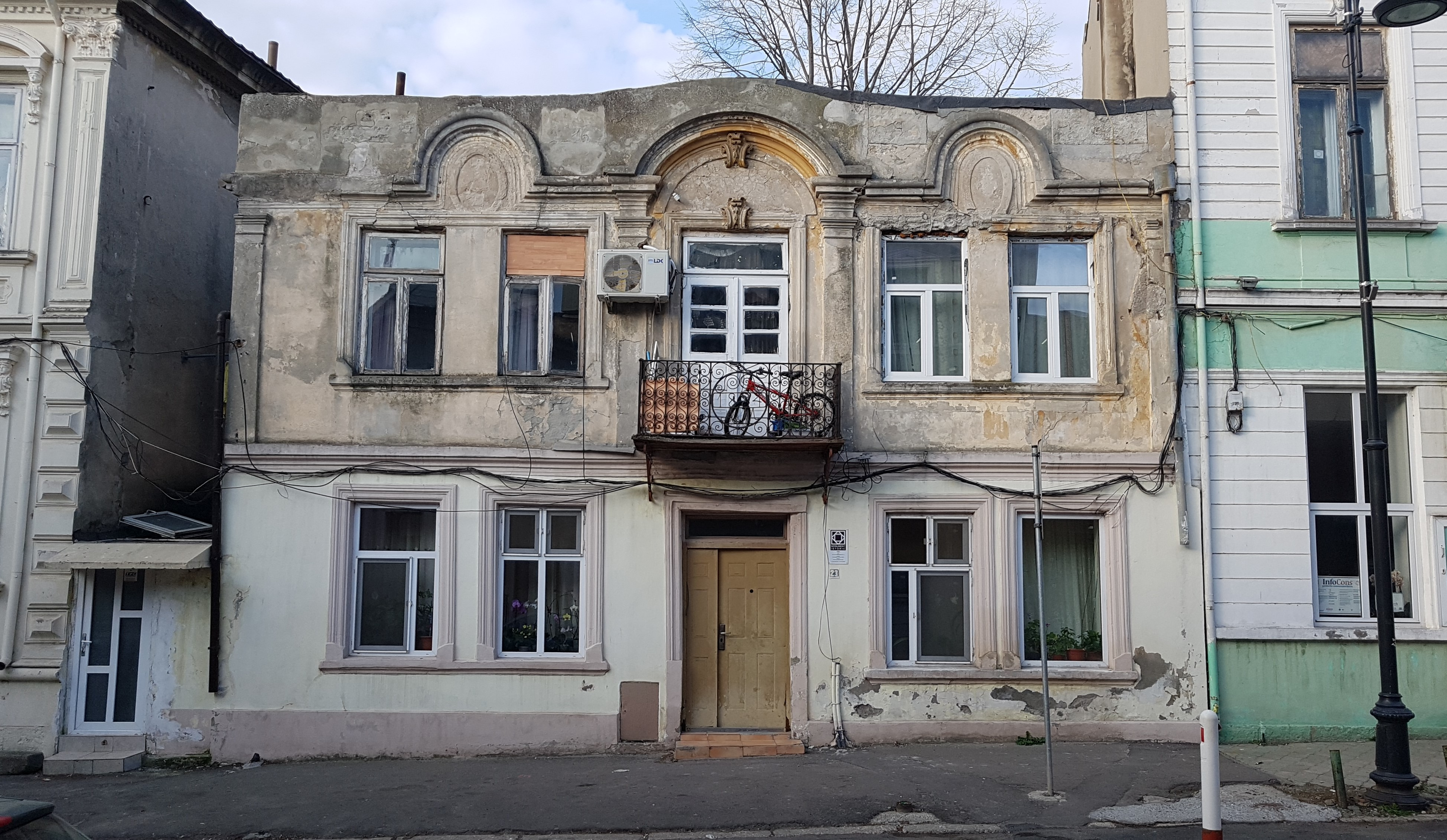 Această clădire monument istoric din Constanța a fost edificată în anul 1884, adică la doar șase ani după primirea Dobrogei de către România (1878). Se află pe Str. Ecaterina Varga (fostă Costache Negri), la nr. 21.